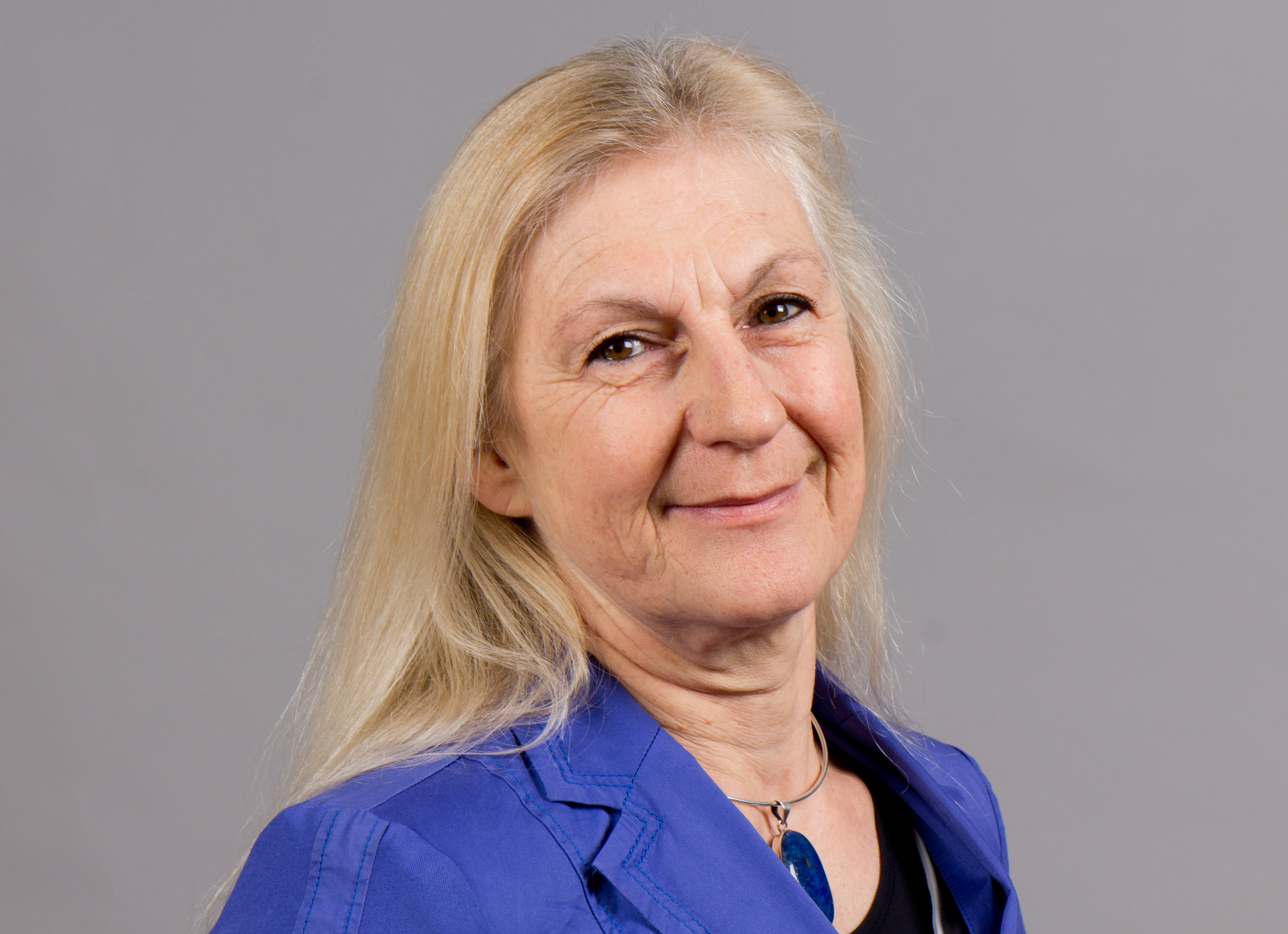 Ulla Brede-Hoffmann (* 9. August 1950 in Gernsbach) ist eine deutsche Politikerin (SPD) und Mitglied des Landtages von Rheinland-Pfalz. Landtag Rheinland-Pfalz 2014 19. bis 20. Februar 2014 in MainzDieses Foto wurde im Rahmen des Projektes „WIKI loves parliaments/Landtag Rheinland-Pfalz“ erstellt. Fragen zur Nachnutzung Wenn Sie Fragen zur Nachnutzung dieses Bildes haben, können Sie sich jederzeit gern an wenden